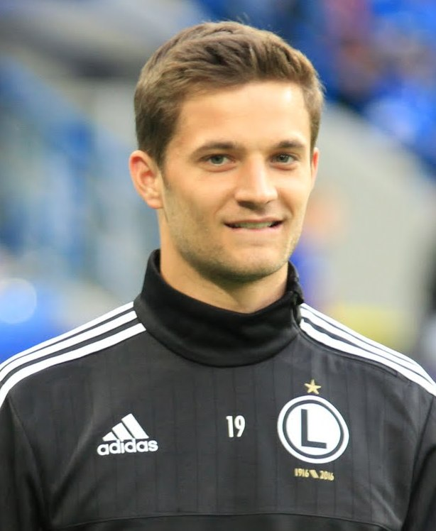 Bartosz Bereszynski przed Superpucharem Polski 2015